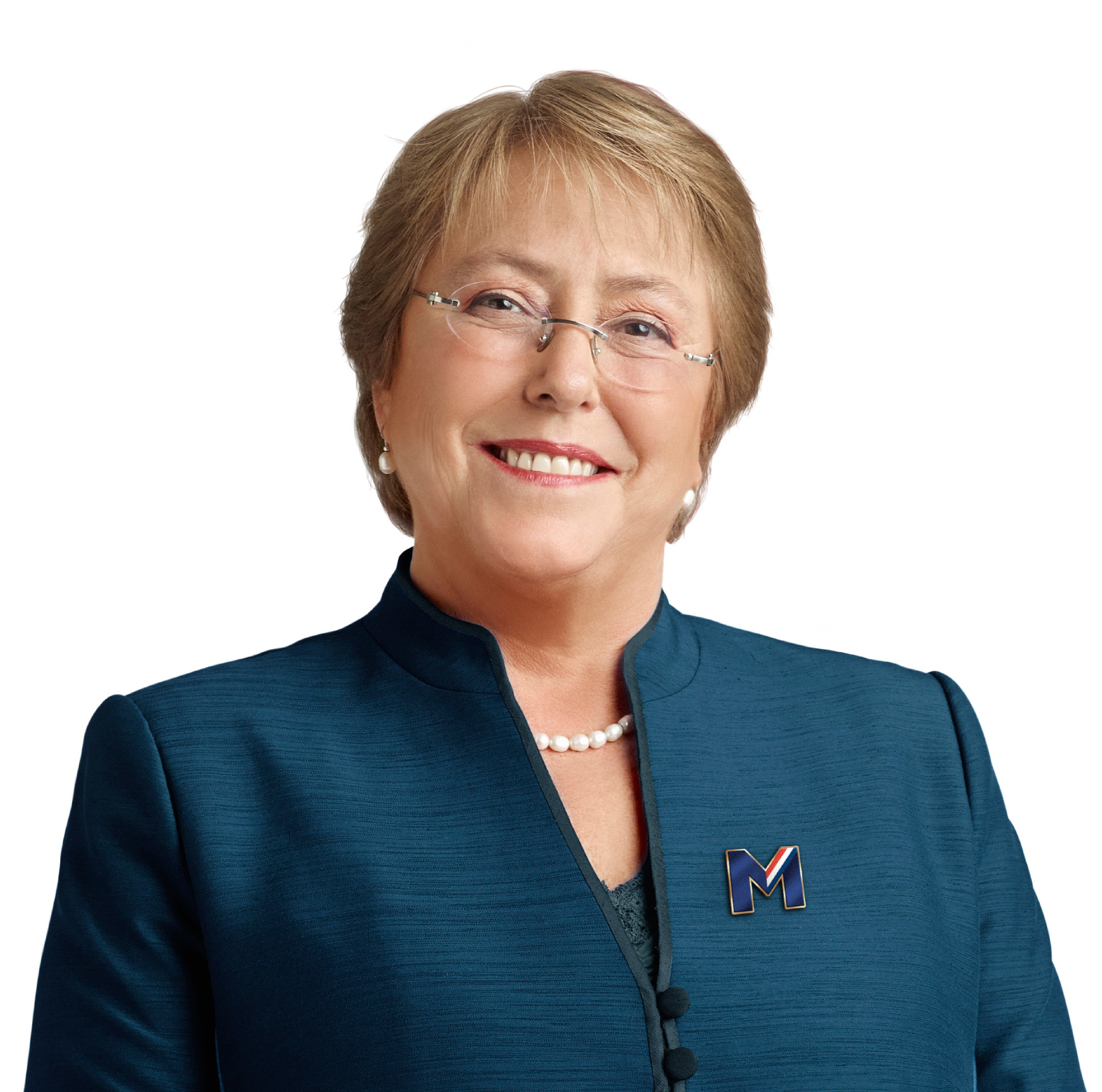 Foto de campaña de Michelle Bachelet para la elección presidencial de 2013 en Chile.